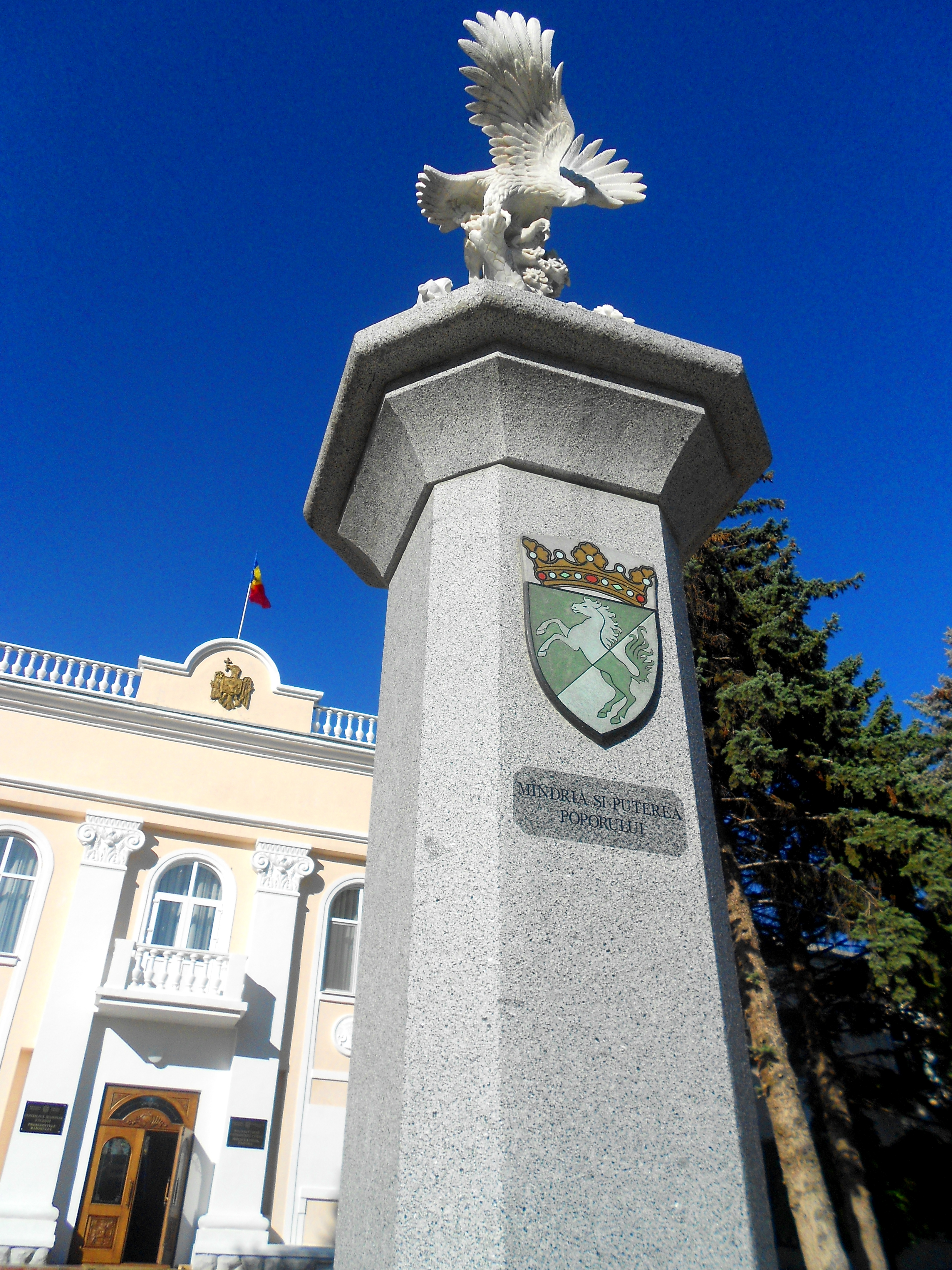 Monument Fălești